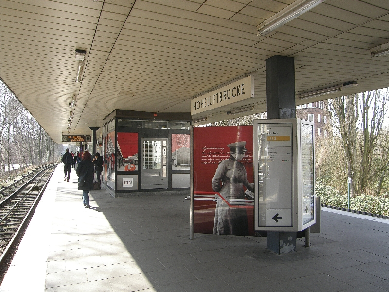 Bilder aus Hamburg